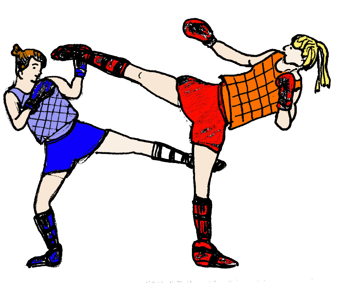 boxe_birmane3.jpg